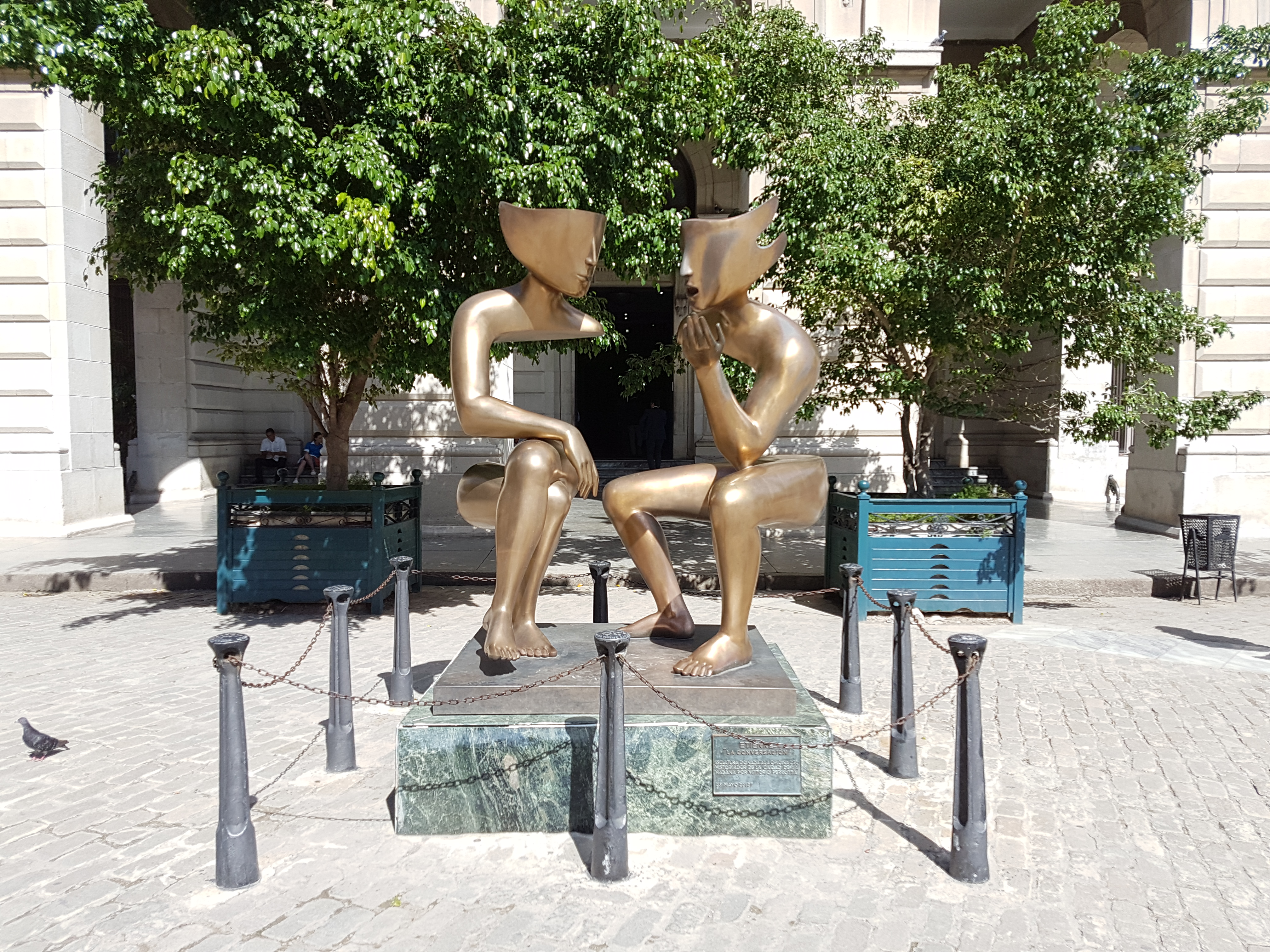 La conversation, don de Vittorio Perrotta la Oficina del Historiador de la Ciudad de La Habana (2012).